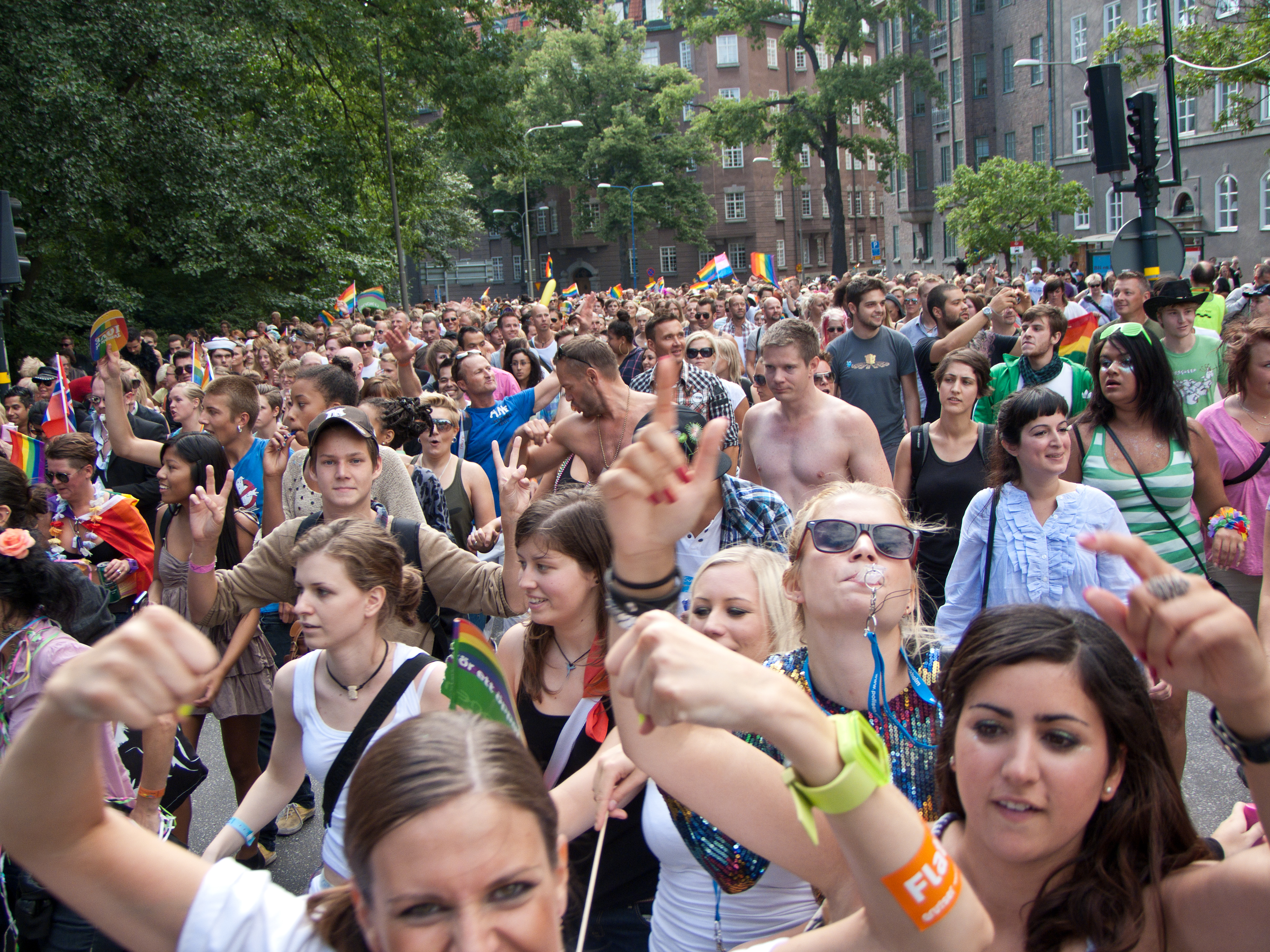 Stockholm Pride Parade 2010